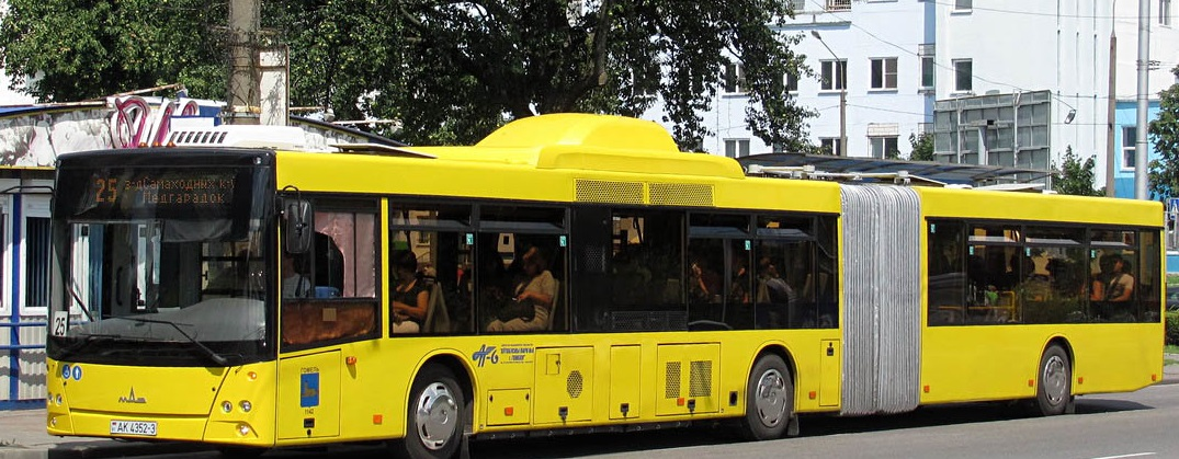 аўтобус